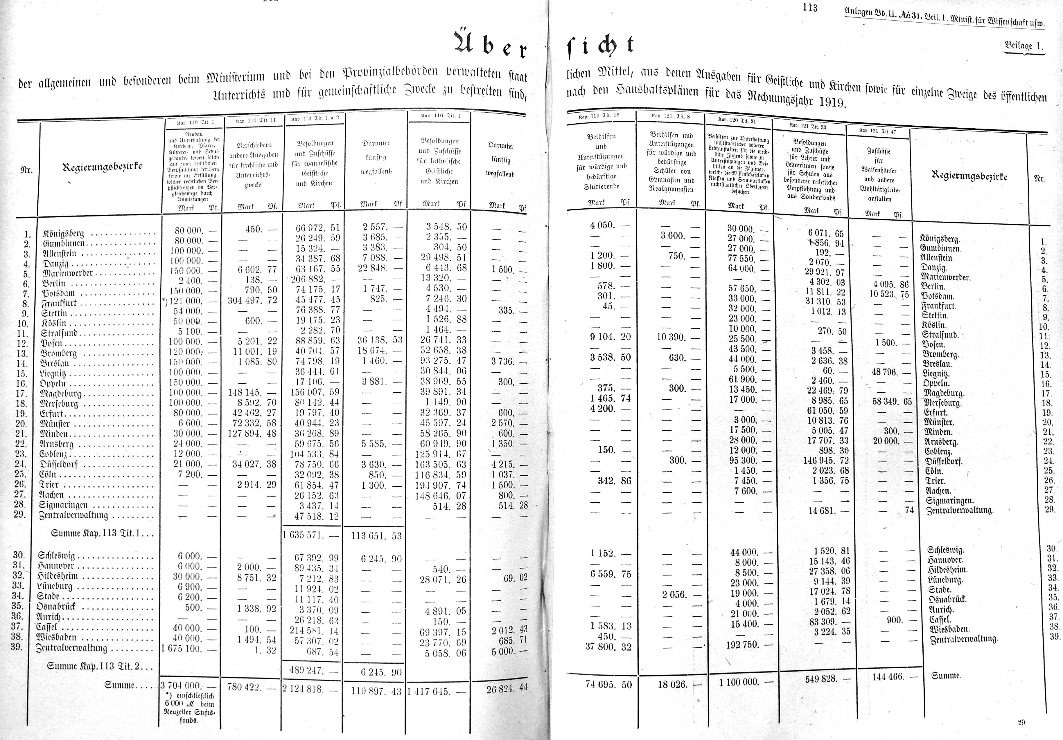 Übersicht der Staatsleistungen in den preußischen Regierungsbezirken im Jahr 1919 Übersicht der allgemeinen und besonderen beim Ministerium und bei den Provinzialbehörden verwalteten staatlichen Mittel, aus denen Ausgaben für Geistliche und Kirchen sowie für einzelne Zweige des öffentlichen Unterrichts und für gemeinschaftliche Zwecke zu bestreiten sind, nach den Haushaltsplänen für das Rechnungsjahr 1919.